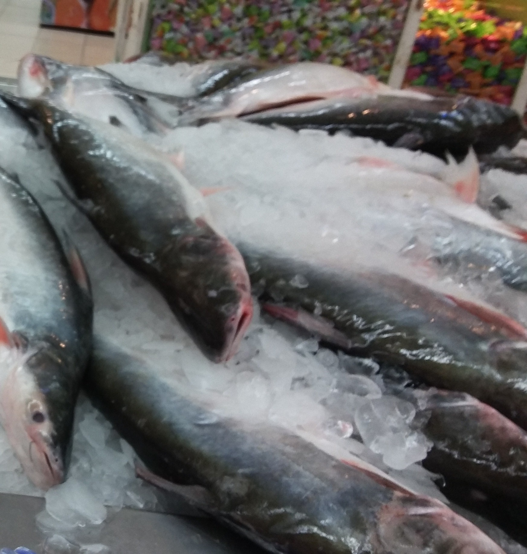 Cá dứa được bán tại siêu thị BigC Phú Thạnh, hình tự chụp